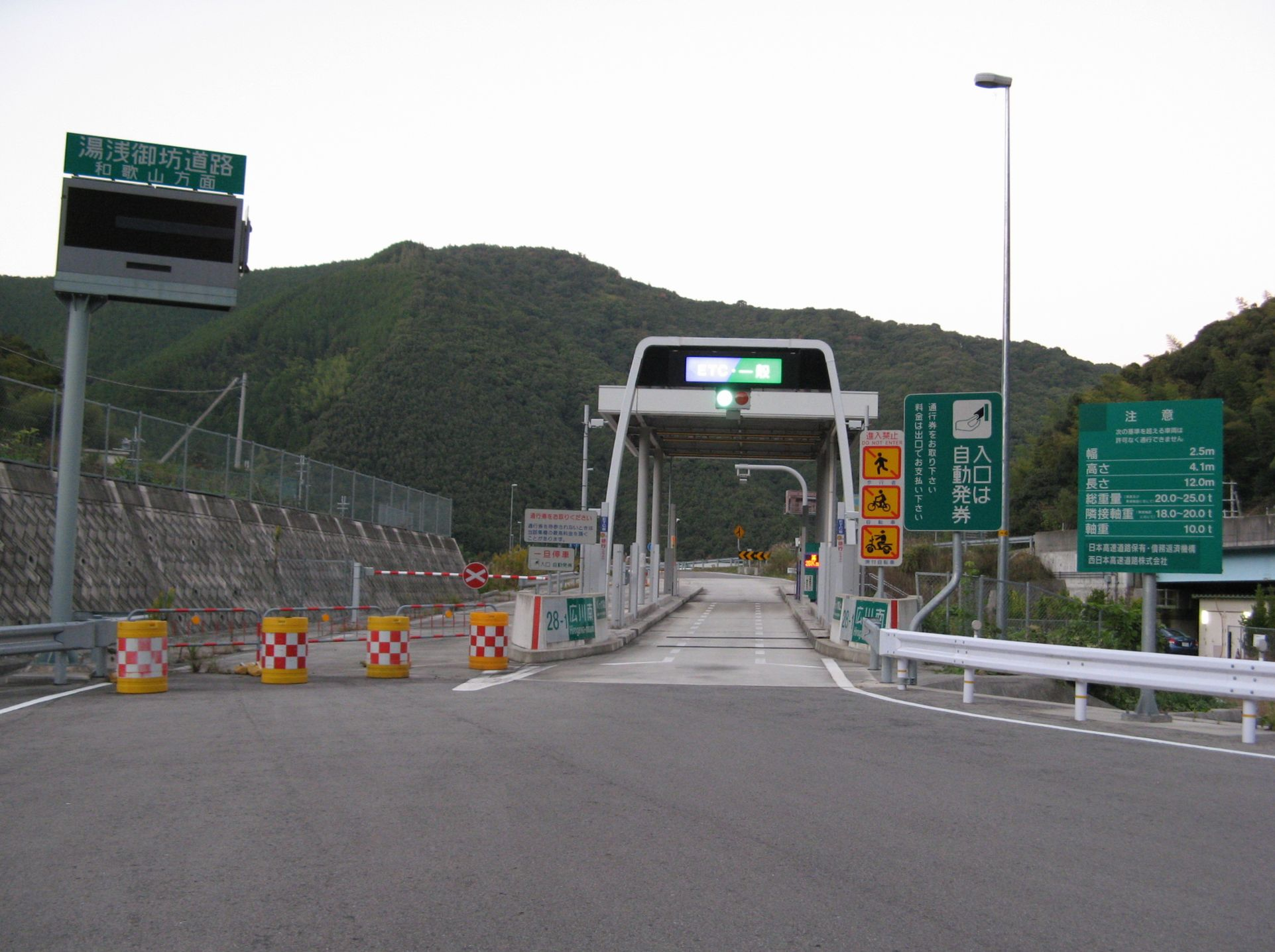 湯浅御坊道路 広川南インターチェンジ 和歌山方面入口